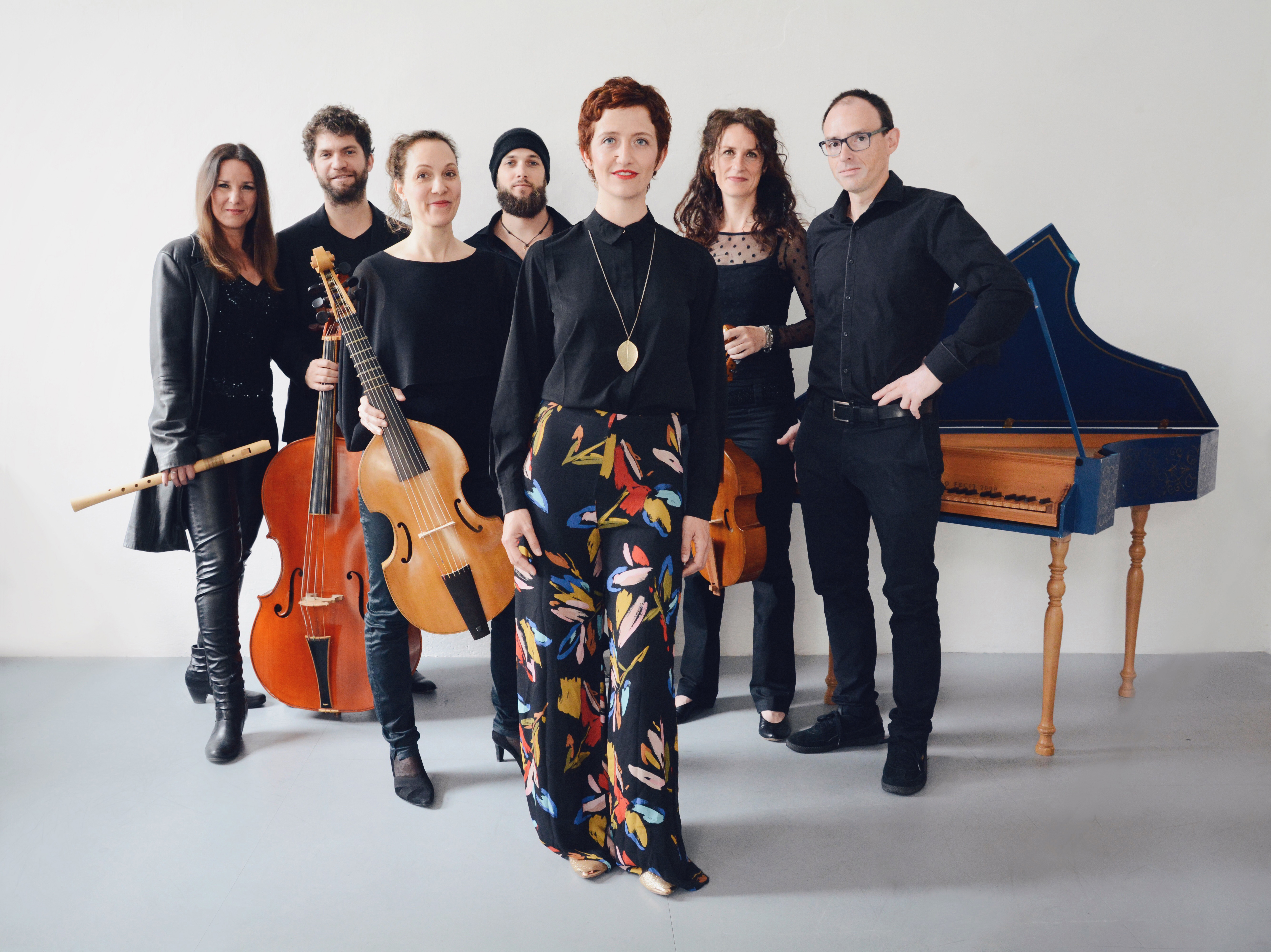 Foto der aktuellen Besetzung